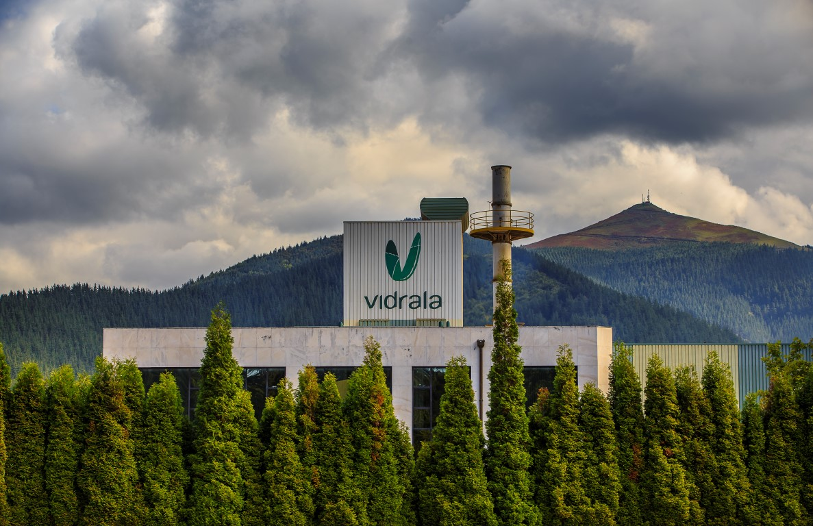 Vidrala Headquerters in Llodio